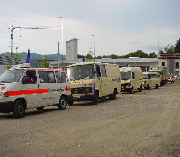 Einsatzfahrzeuge des DRK bereiten sich vor um gemeinsam eine längere Strecke zurückzulegen. Bild stammt vo der EE 3 Freiburg Land